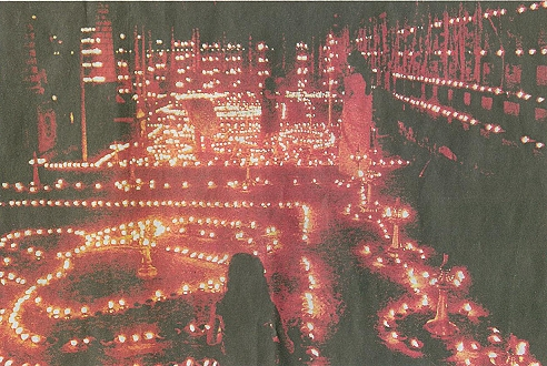 ശിവരാത്രി ദീപക്കാഴ്ച